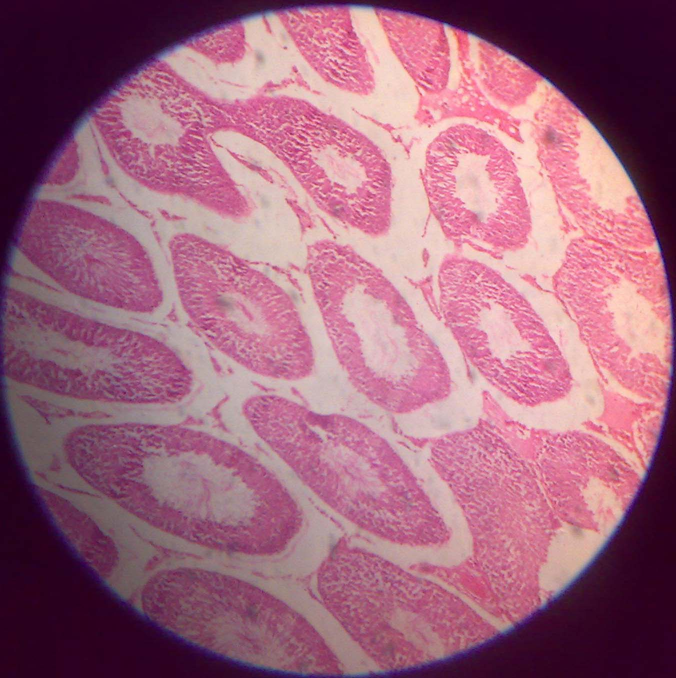 Germinal epithelium slide